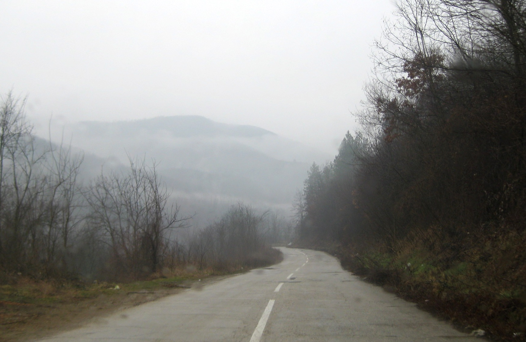 Dankoviće, Kuršumlija